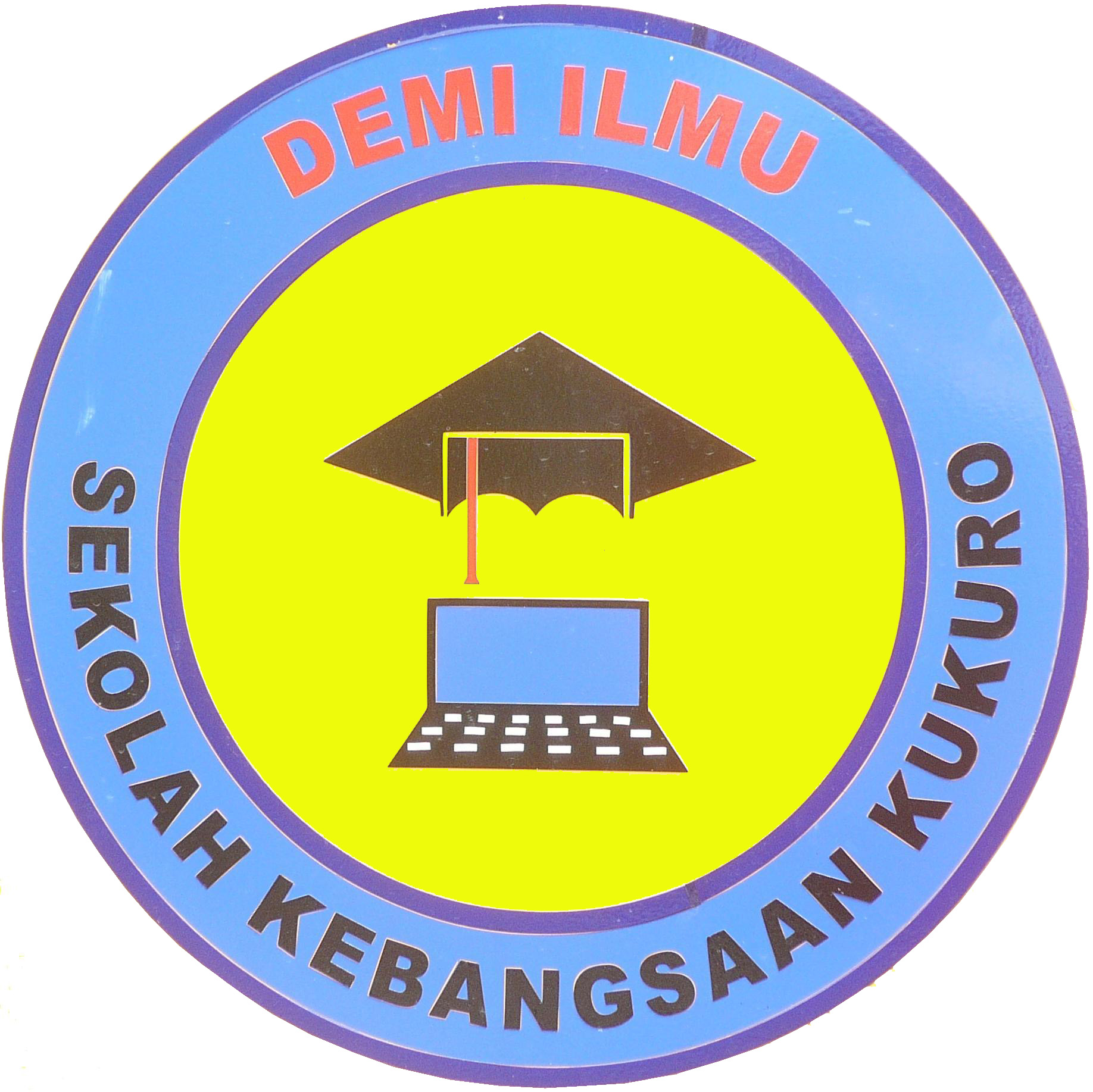 Lencana Sekolah